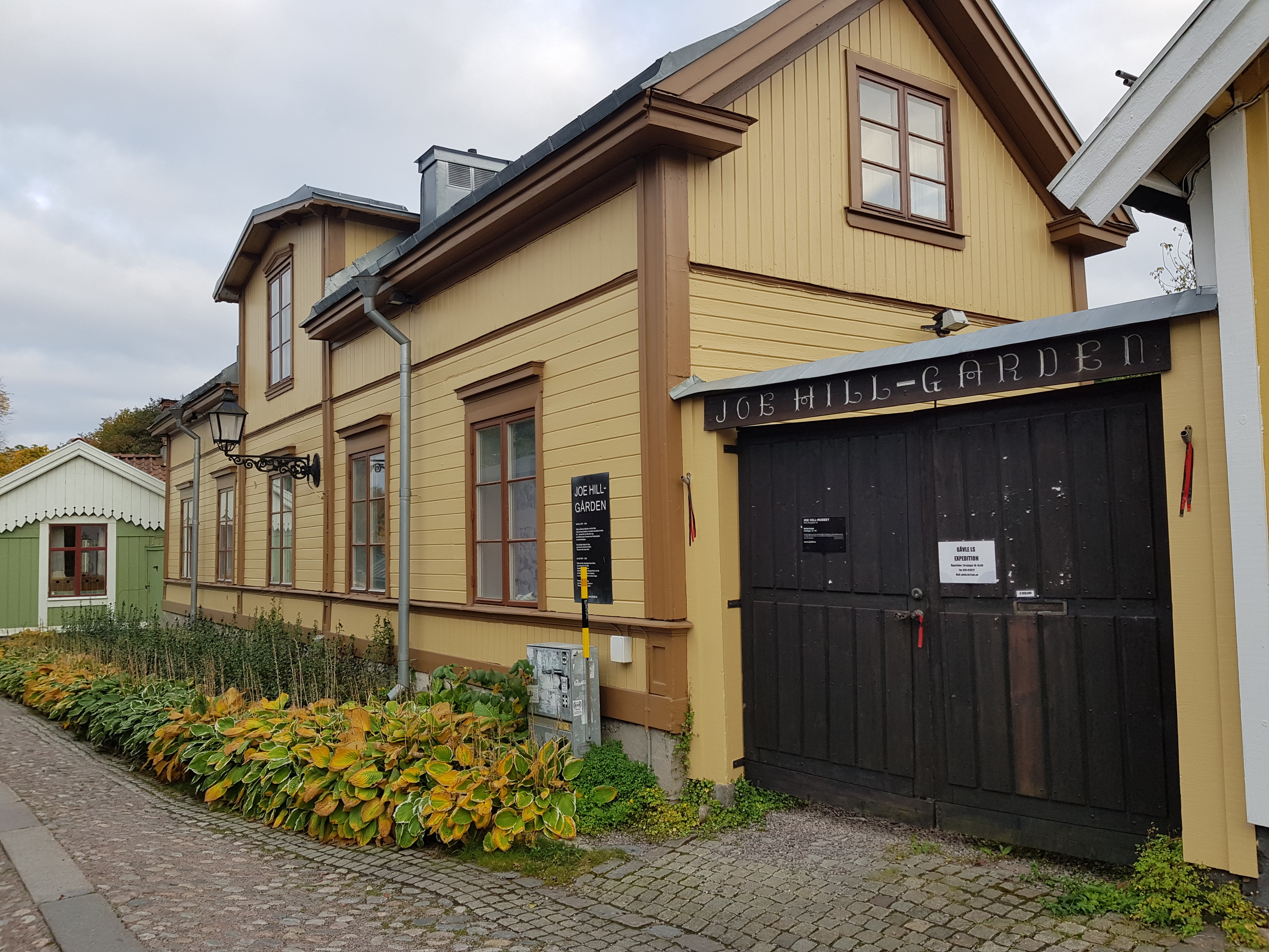 Joe Hill-gården i Gävle där Joe Hill föddes 1879. Idag finns där ett museum.